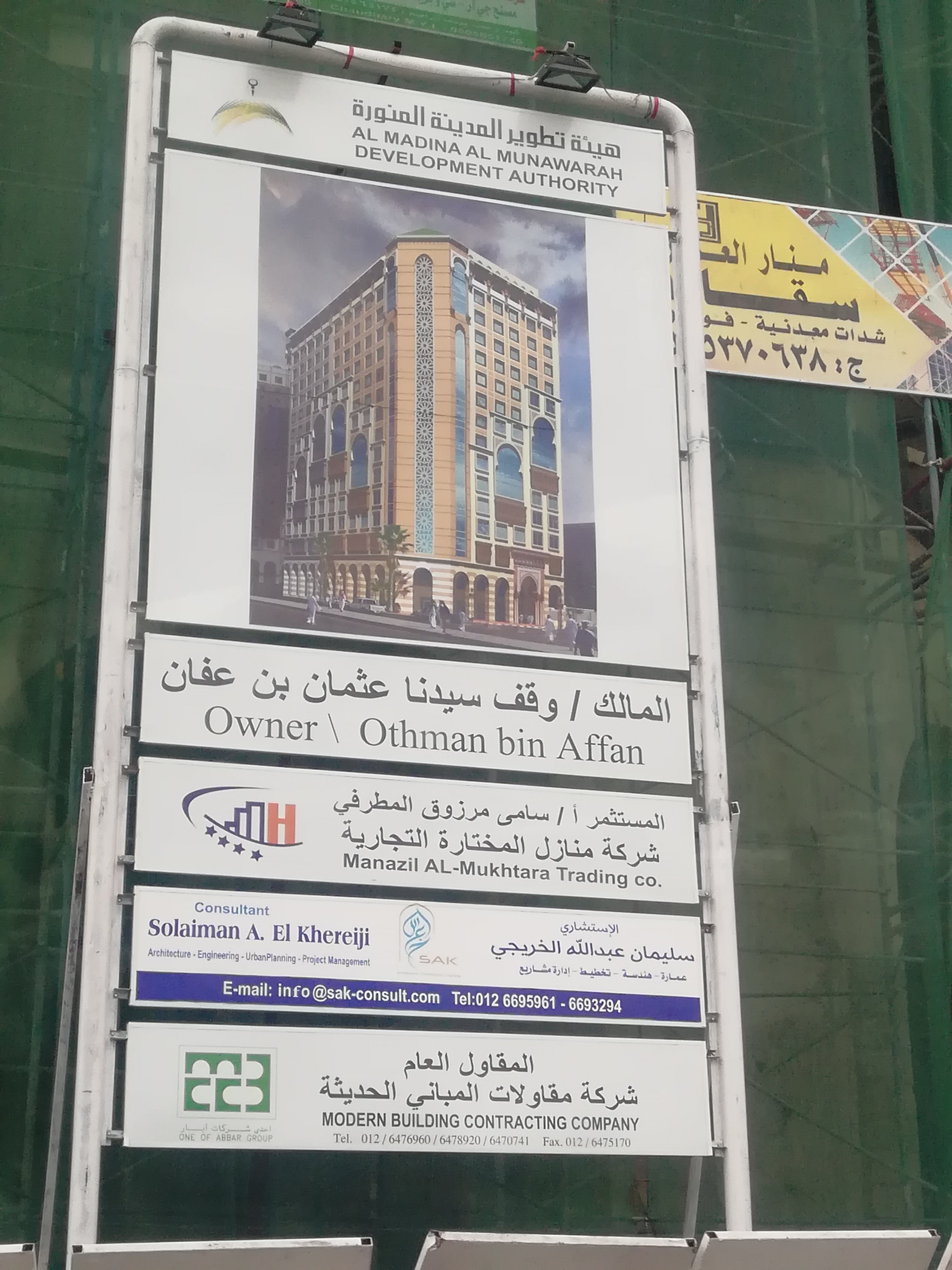 al-Madinah al-Munawarah Uthman bin Affan waqf al-Madina al-Munawarah development authority